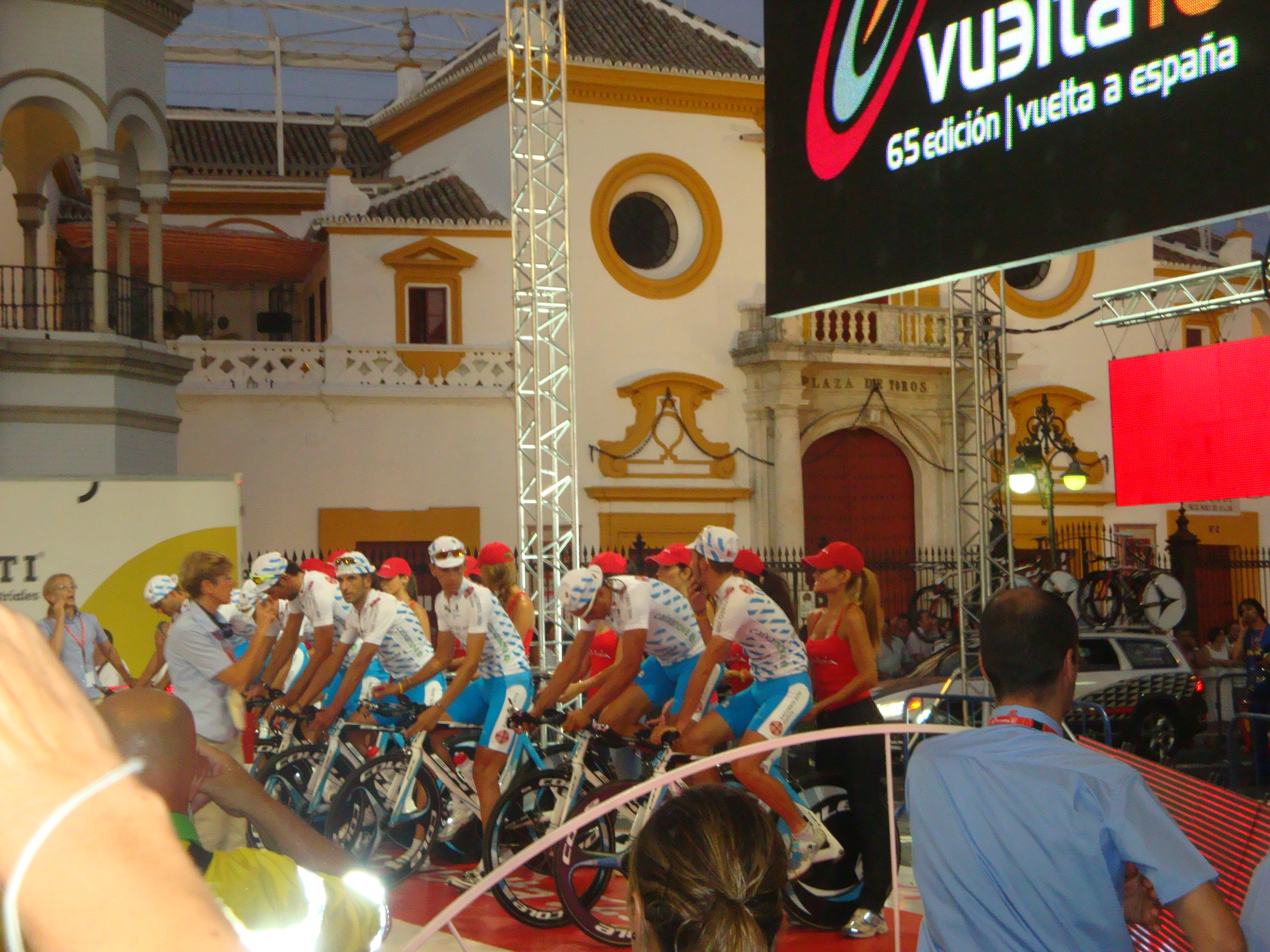 Equipo debutante en la Vuelta a España 2010